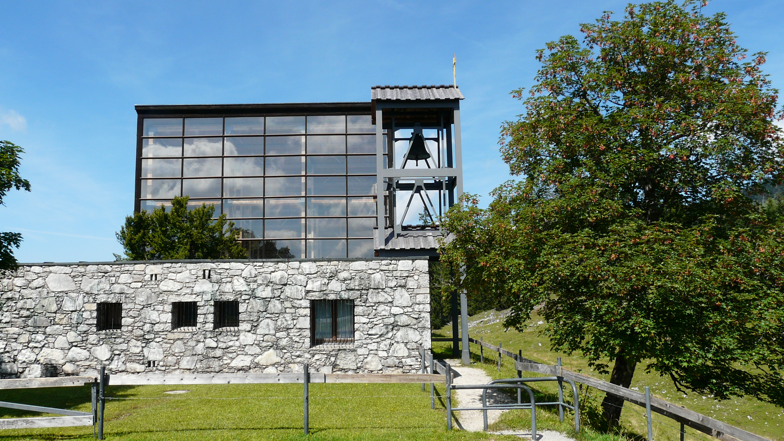 St. Johann im Gebirge auf der Winklmoosalm, Reit im Winkl